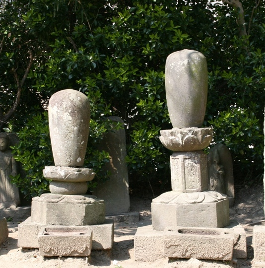 二つの形式の無縫塔。作者撮影